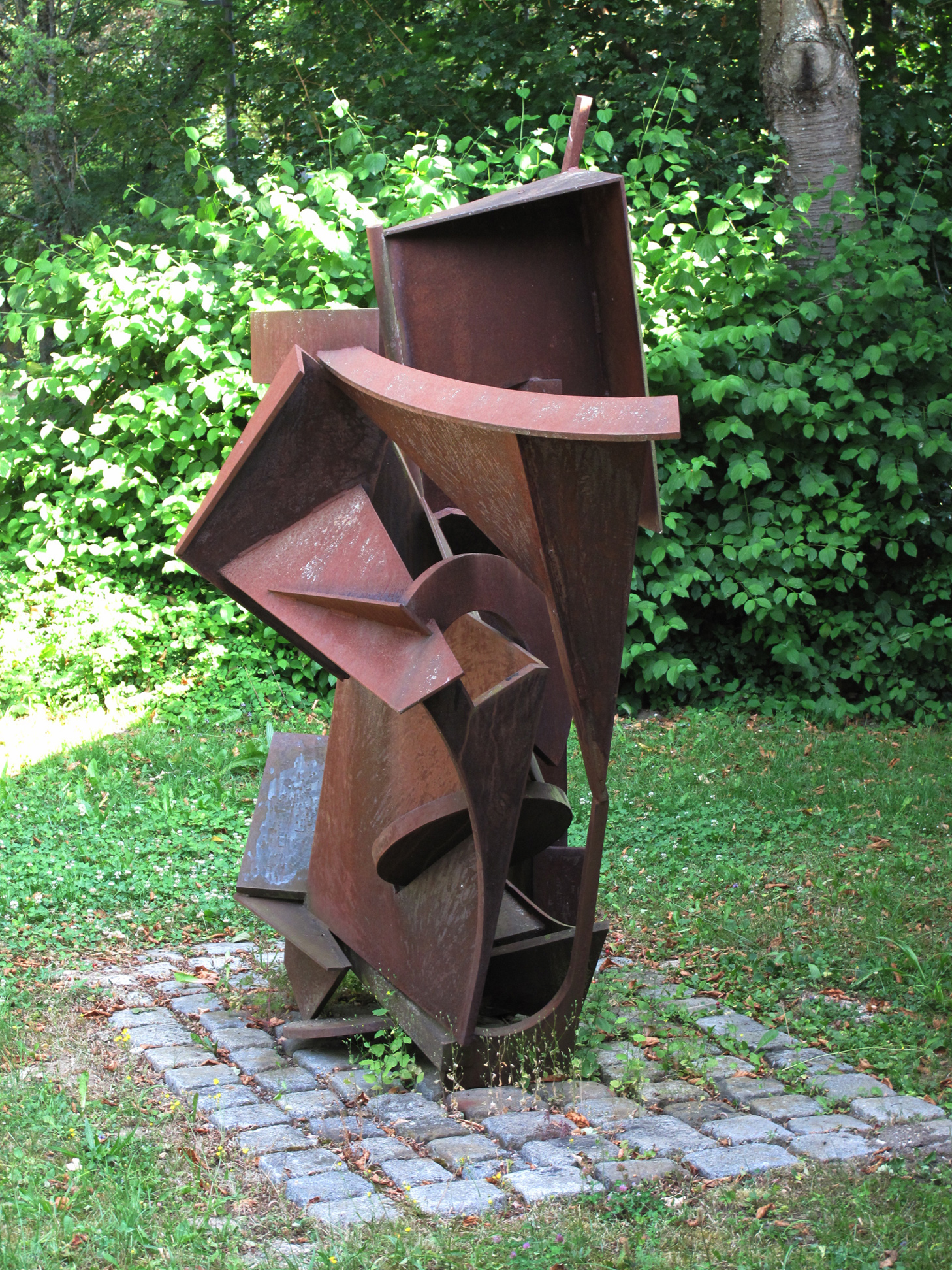 Gustav Reinhardt, Machismo, 1989, - Kunstpfad Universität Ulm, Baden-Württemberg, Deutschland